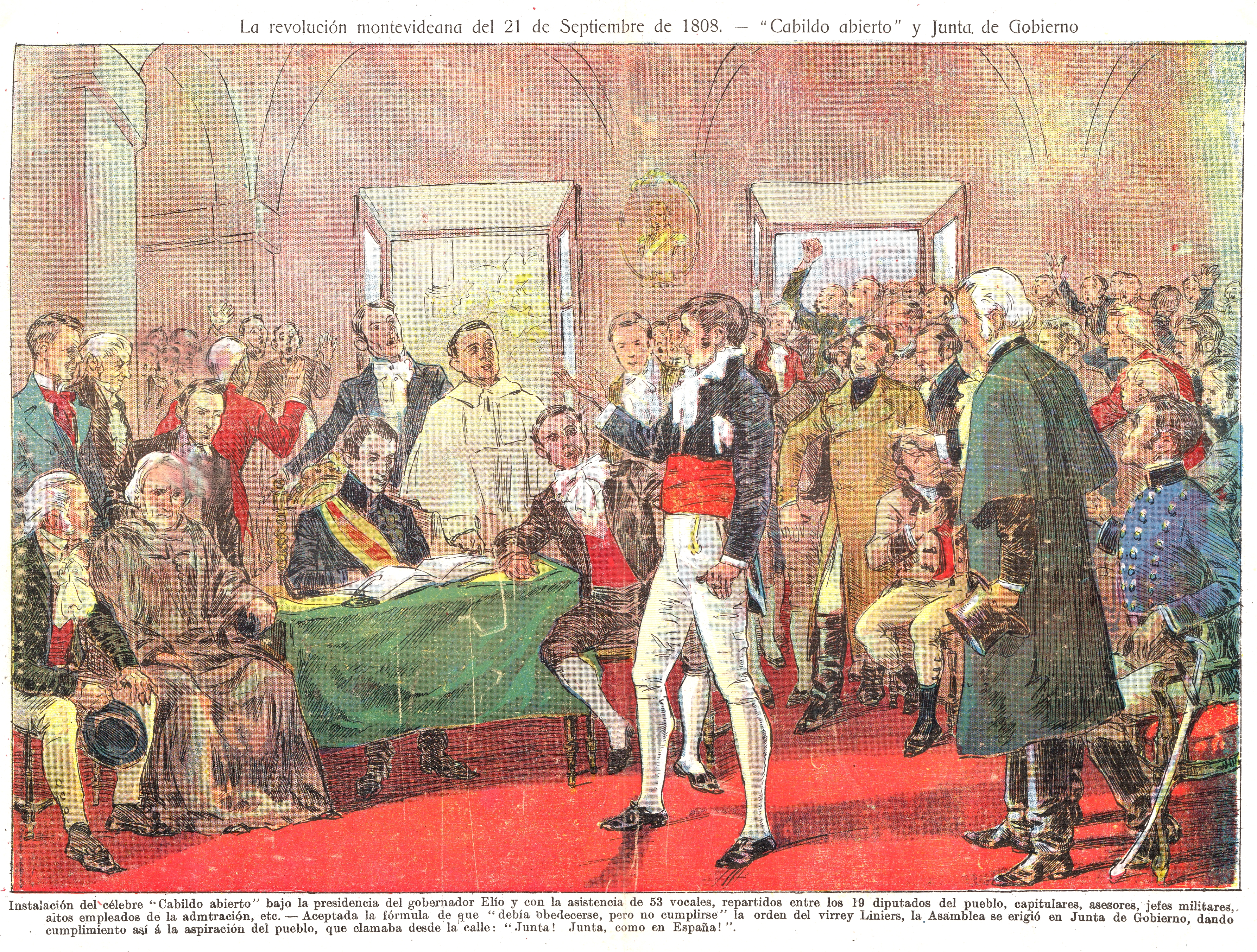 Dibujo central de dos páginas que apareció en el nº 109 de la revista "La Semana" fechada 23 de setiembre de 1911. Se trata de una ilustración que retrata la instalación del Cabildo abierto de Montevideo el 21 de setiembre de 1808. Presumiblemente fue creado por Orestes Acquarone (1875 - 1952), el director y principal dibujante y caricaturista de la revista.